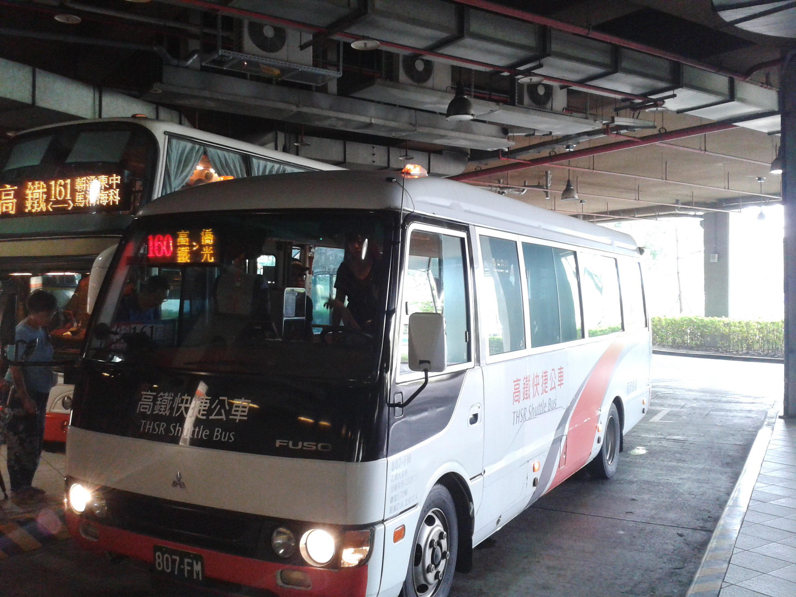 中文（台灣）: 和欣客運807-FM營運台中市公車160路，停靠台灣高鐵台中站。